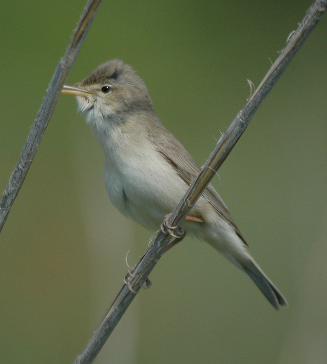 Hippolais pallida Sedmohlások bledý